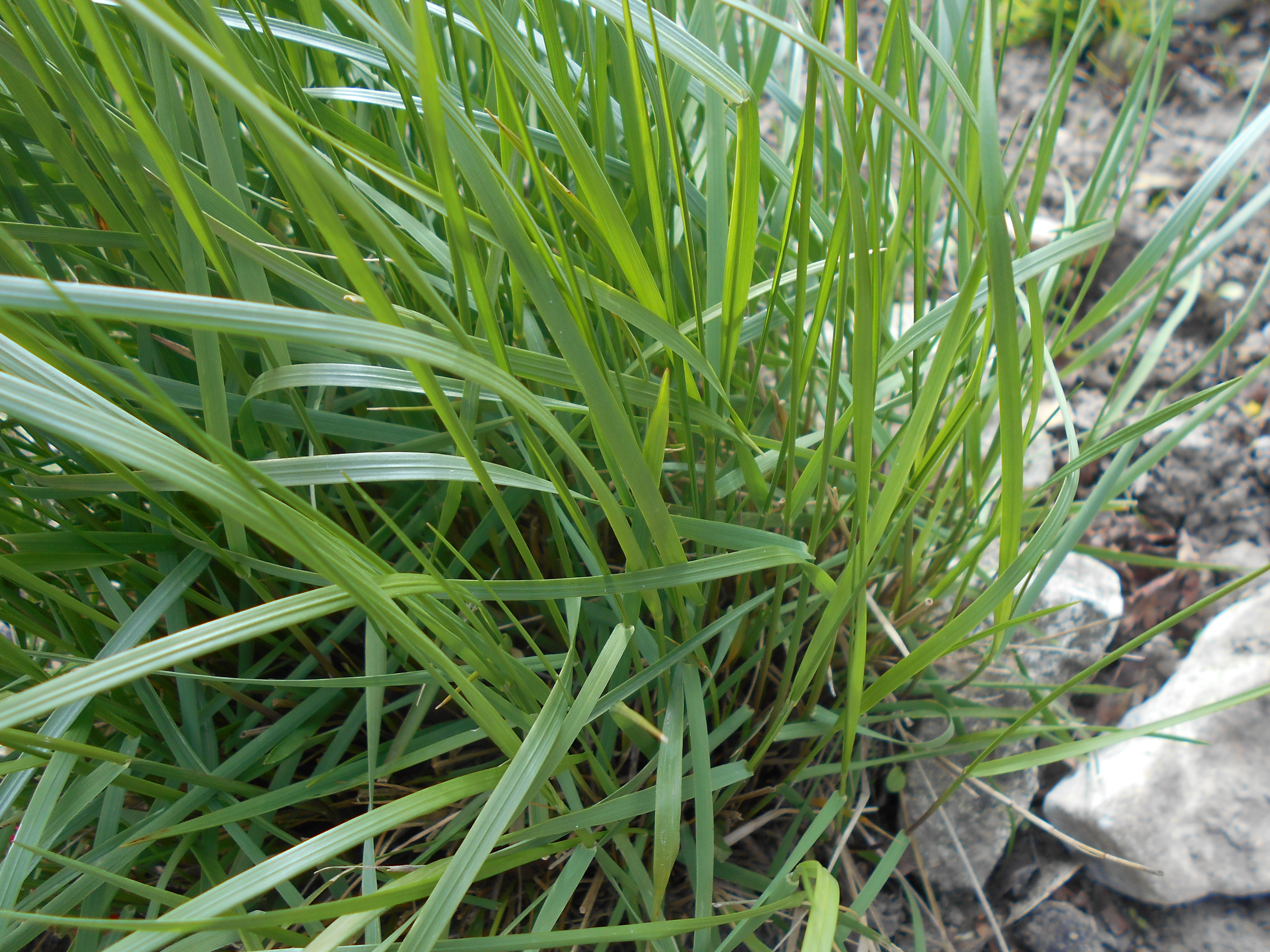 Perłówka siedmiogrodzka (Melica transsilvanica), Ogród Botaniczny UMCS w Lublinie.